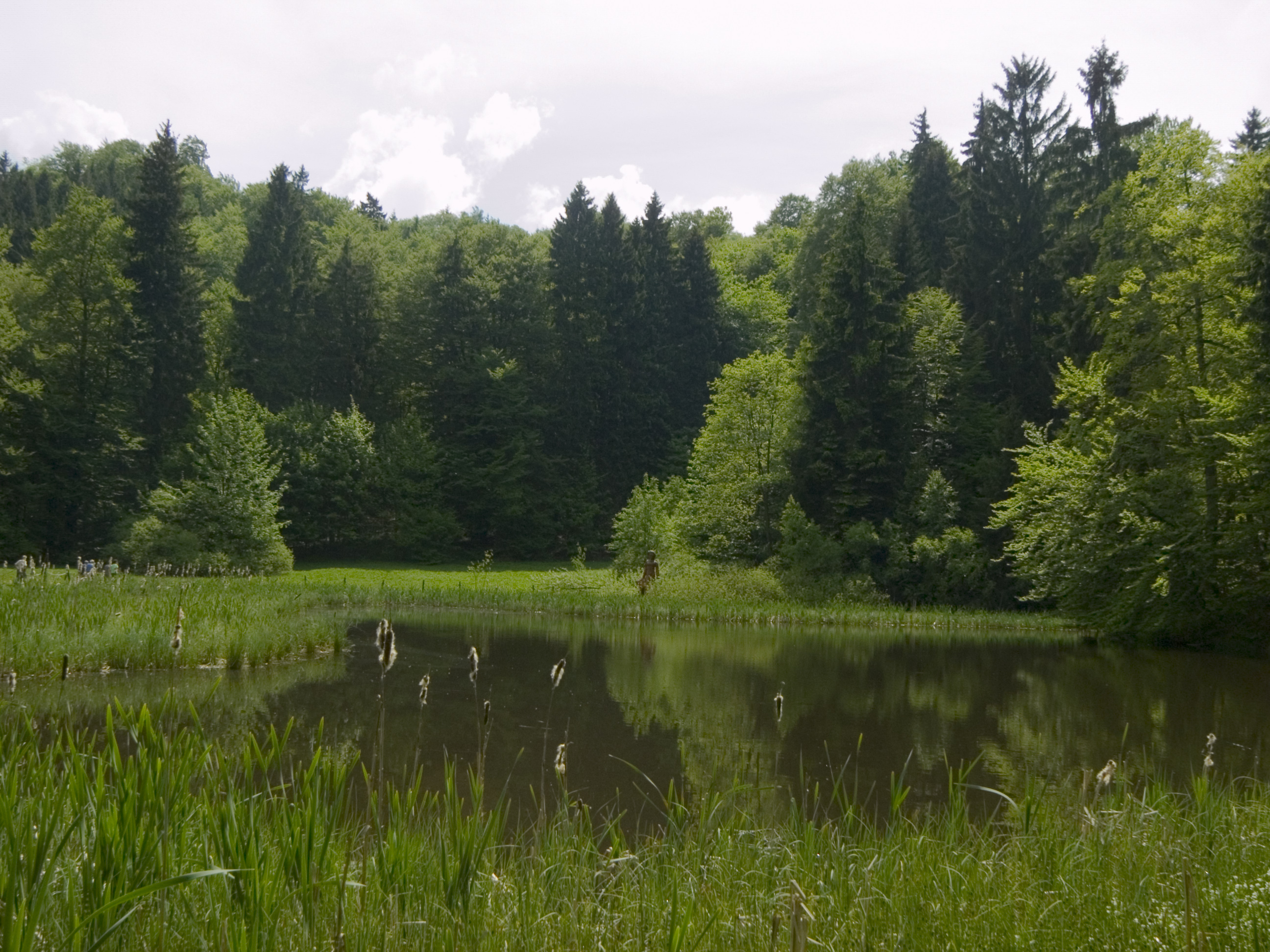 Frau-Holle-Teich auf dem Hohen Meißner